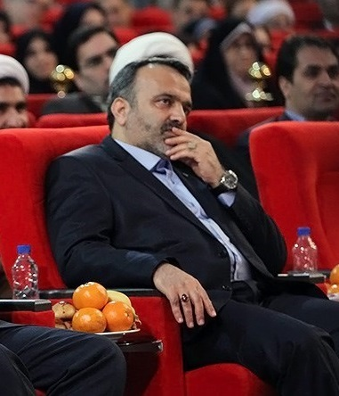 علیرضا رشیدیان در مراسم تودیع و معارفه استاندار خراسان رضوی ،اسفند ۱۳۹۲